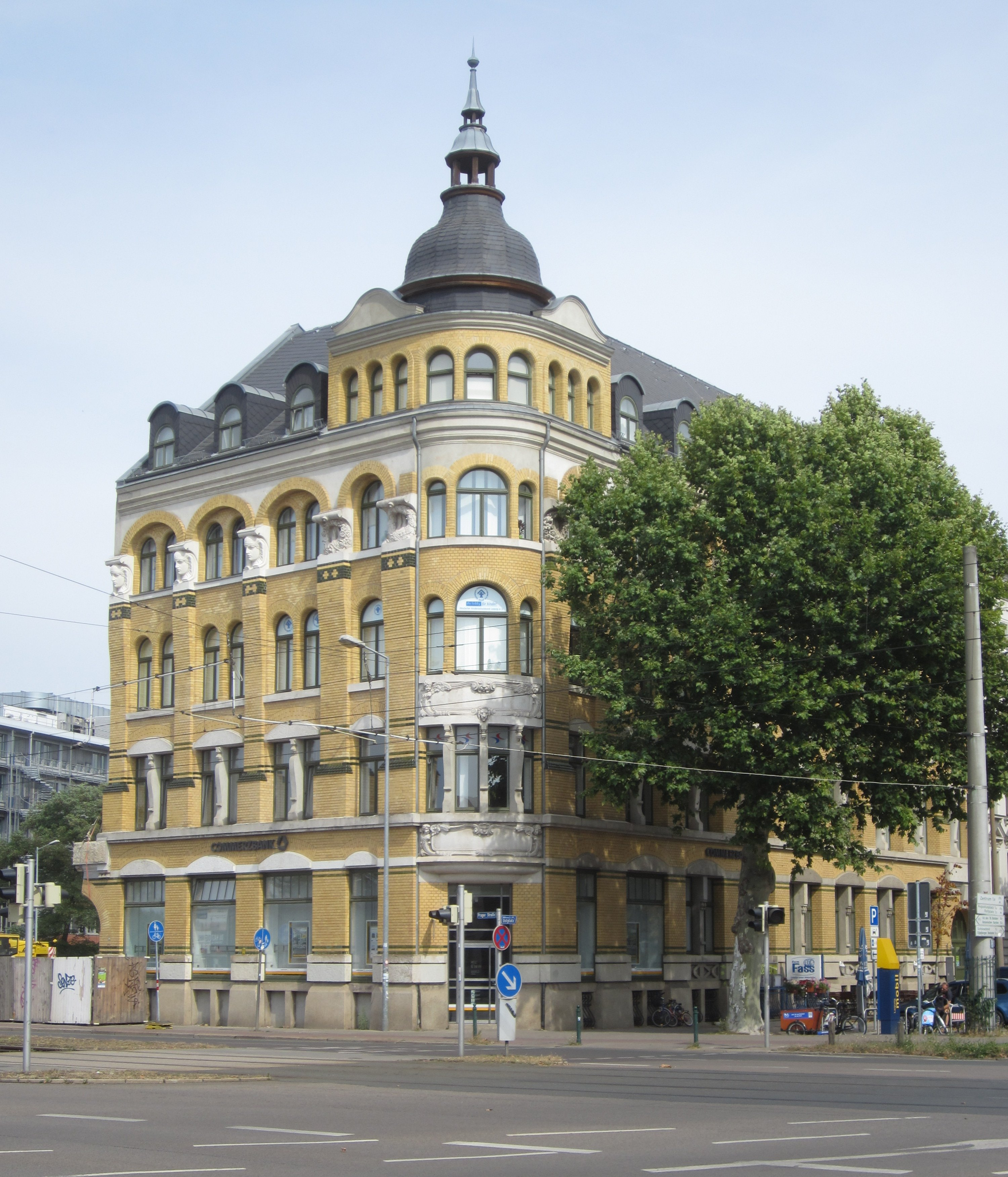 Das heutige Mietshaus Johannisallee 20 am Ostplatz wurde als Verlagsgebäude des Verlags Velhagen & Klasing erbaut. Nach Abschluss der Renovierungsarbeiten nach der deutschen Wiedervereinigung befand sich in diesem im Erdgeschoss eine Niederlassung der Commerzbank sowie seit 1996 die Tagesklinik und die Forschungsabteilung der Klinik für Psychiatrie der Universität Leipzig. Nach Verkauf des Gebäudes in der Emilienstraße, in dem die Ambulanz der Klinik für Psychiatrie bis dato untergebracht war, zog 2004 auch die Ambulanz der Klinik und Poliklinik für Psychiatrie des Leipziger Universitätsklinikums in dieses Gebäude ein. Mit Fertigstellung des neuen Universitätsklinikums in der Liebigstraße und der Umbauarbeiten an der ehemaligen, 1930 eröffneten Orthopädischen Klinik der Universität (Ecke Semmelweisstraße/Philipp-Rosenthal-Straße) zogen alle Organisationseinheiten der Klinik und Poliklinik für Psychiatrie in das Gebäude Semmelweisstraße 11 / Ecke Philipp-Rosenthal-Straße.